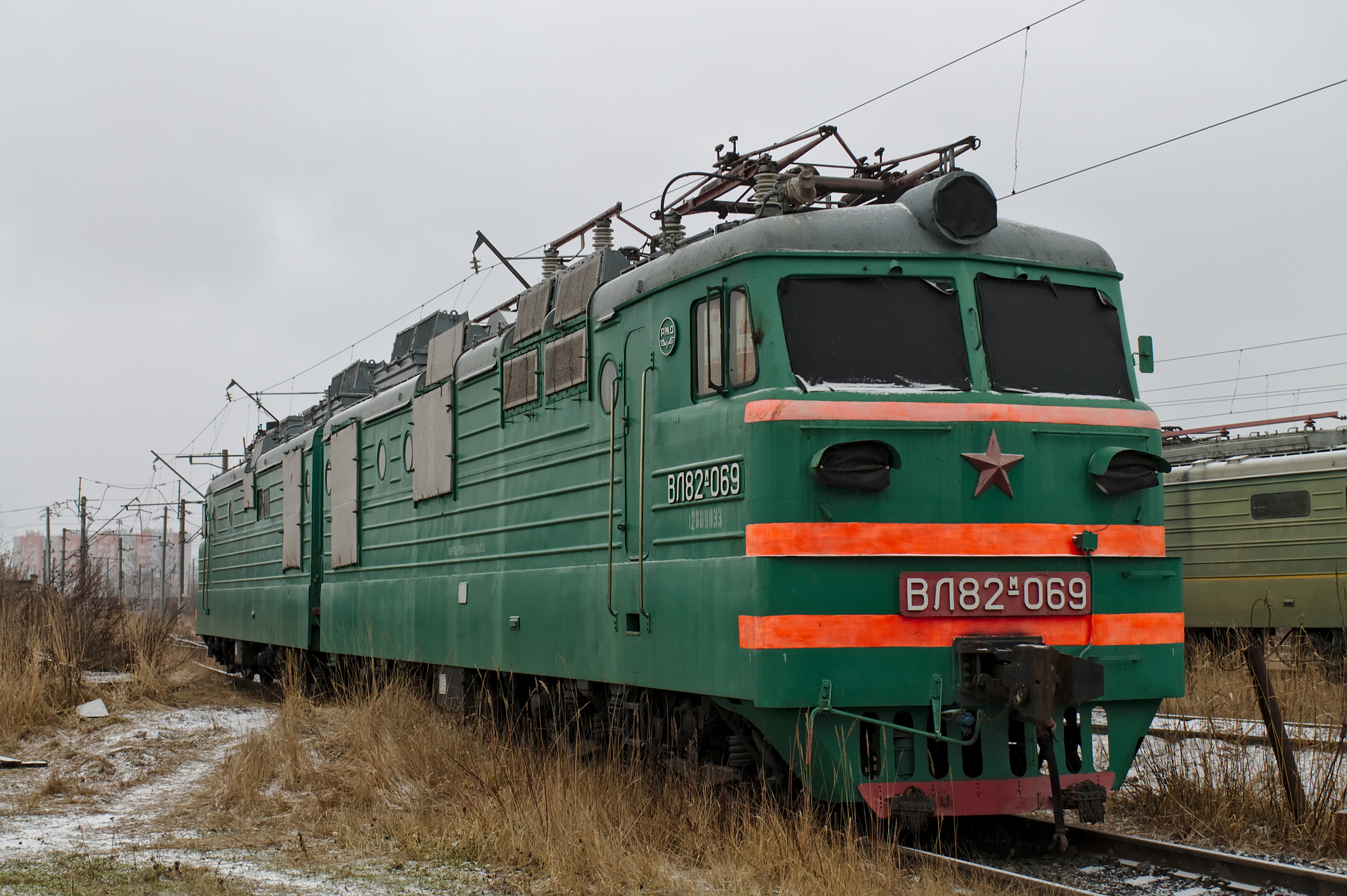 ВЛ82м-069, станция Волховстрой-I. см. фото 638051 в альбоме автора